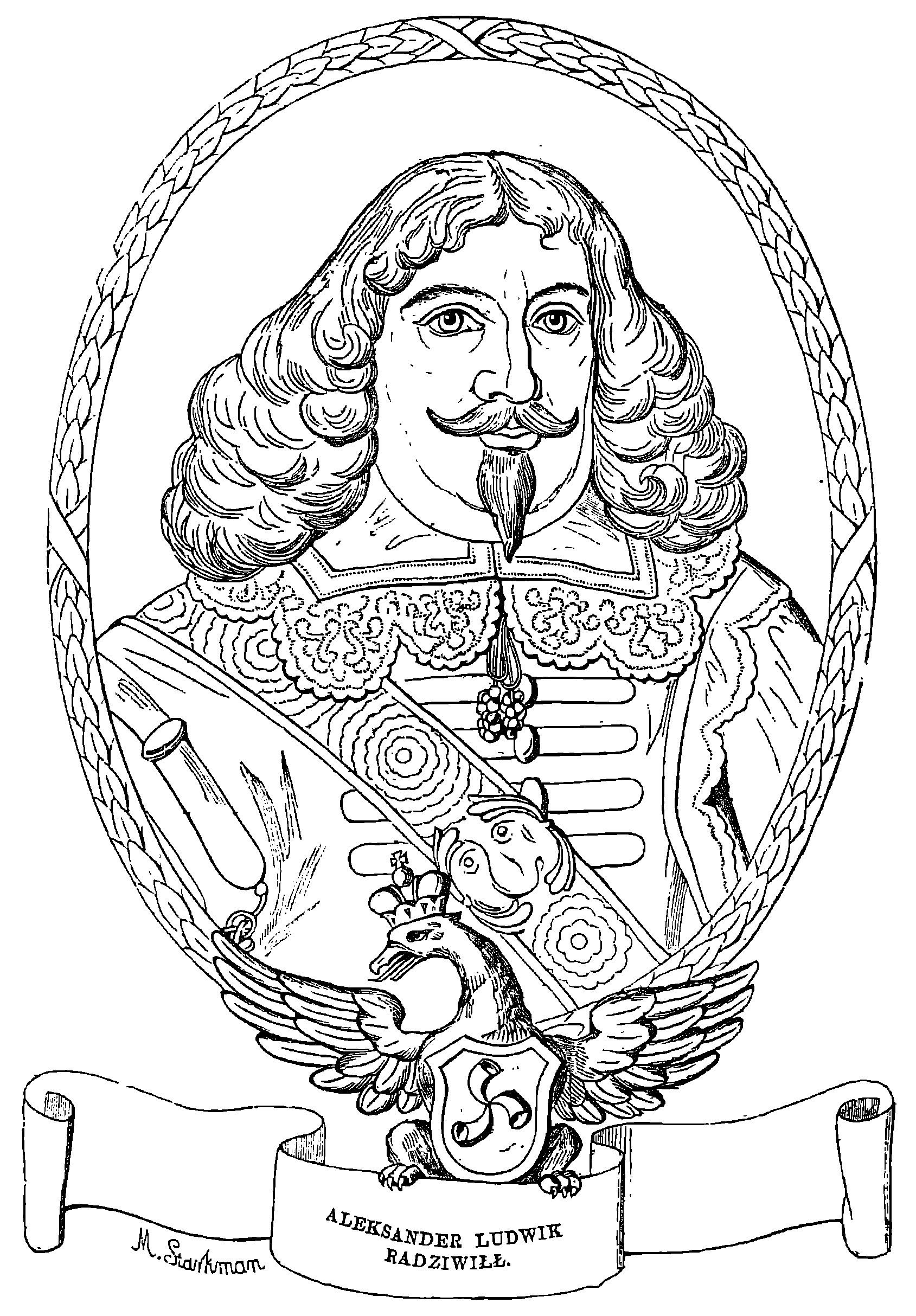 Беларуская (тарашкевіца): Партрэт Аляксандра Людвіка Радзівіла (Alaksandar Ludvik Radzivił)